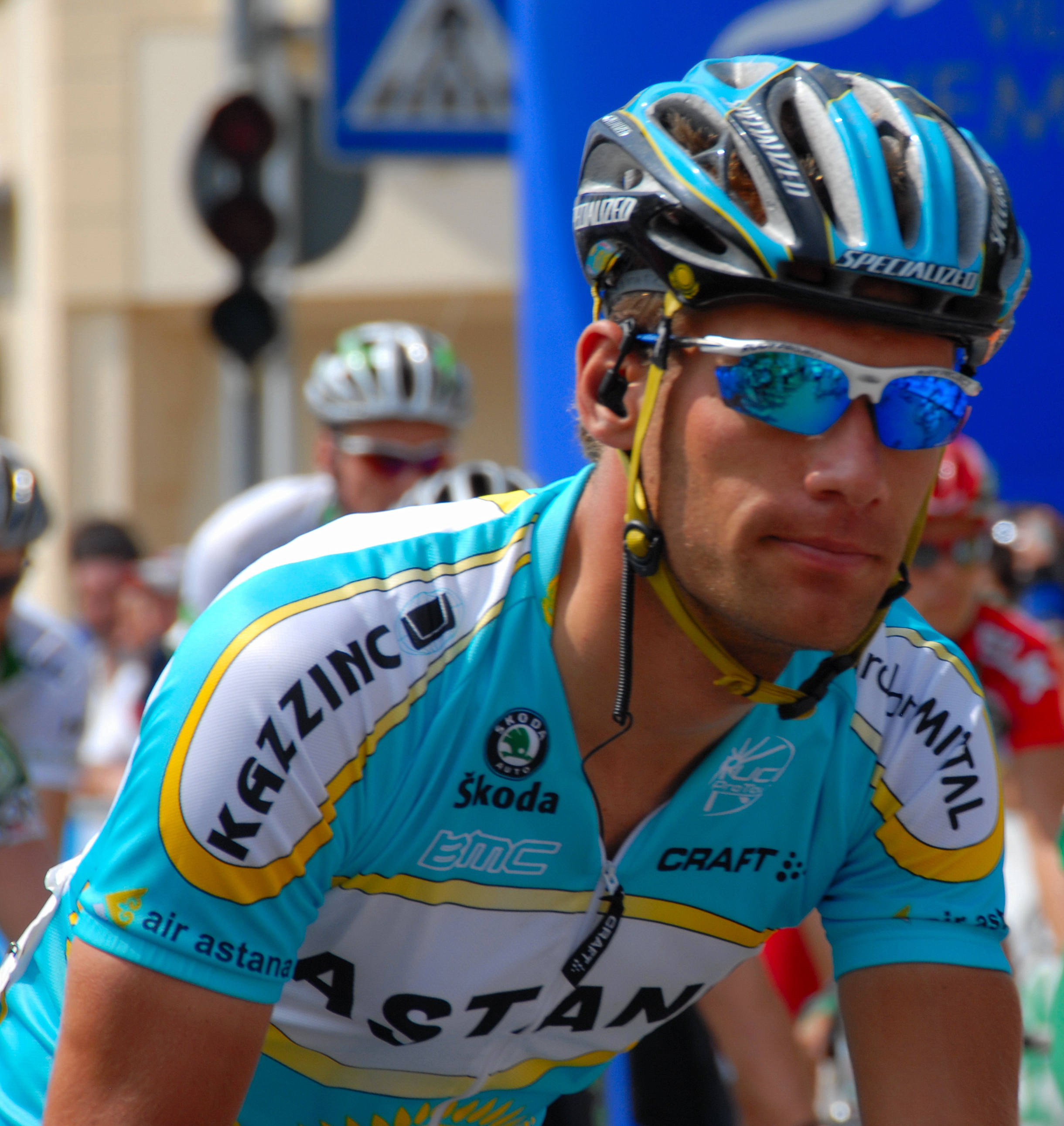 De Benoît Joachim beim Départ zu Miersch vun der 4. Etapp vum Skoda Tour de Luxembourg 2007.